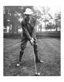 Wingham, 2x winnaar US Amateur Open